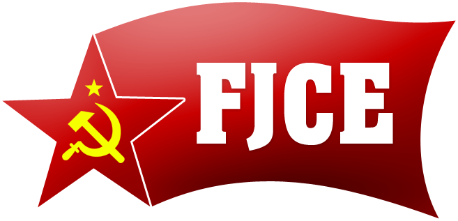 Logo de la Federación de Jóvenes Comunistas de España